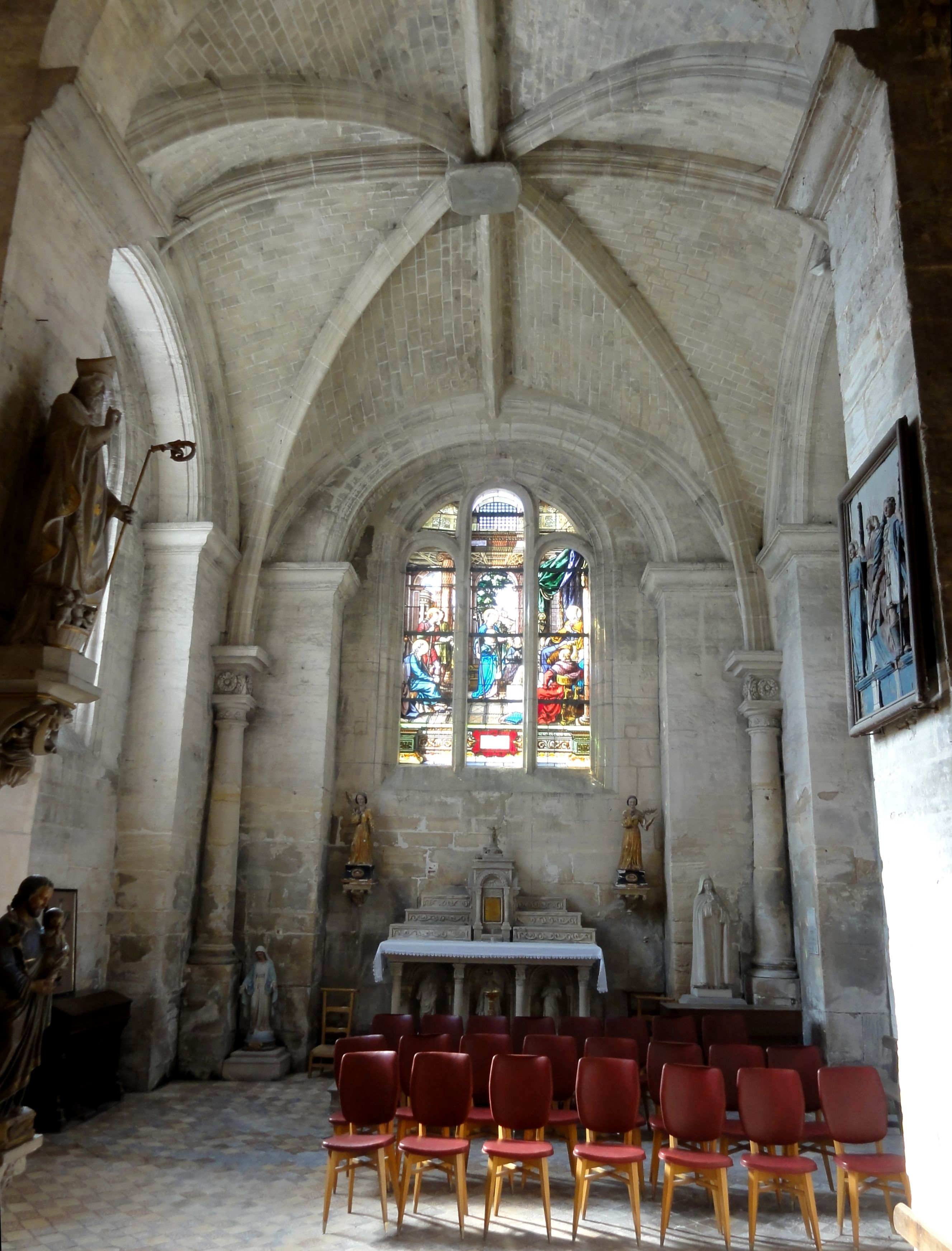 Croisillon sud, vue vers le sud.